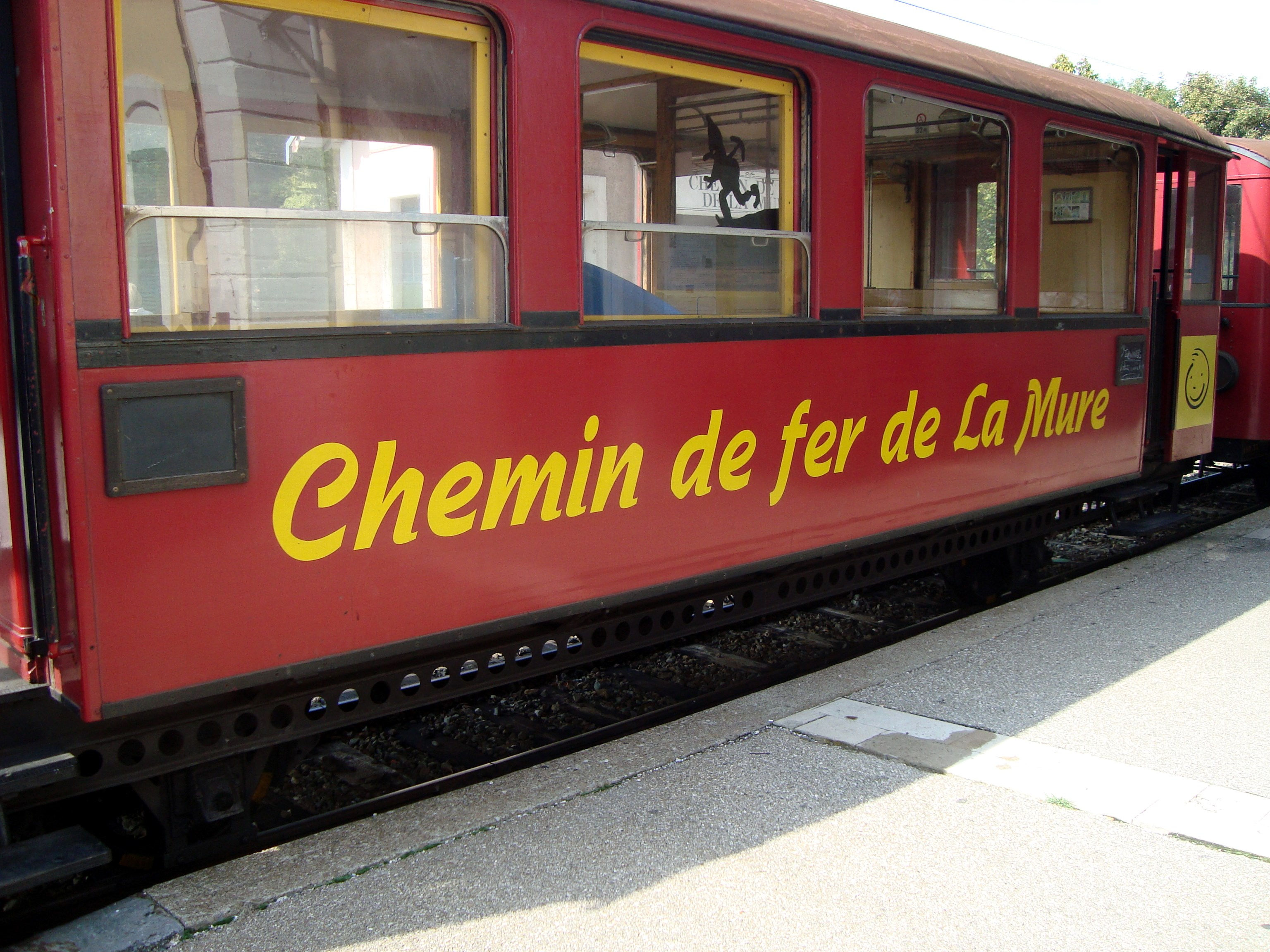 Wagon de voyageur en gare de La Mure, Isère, France.